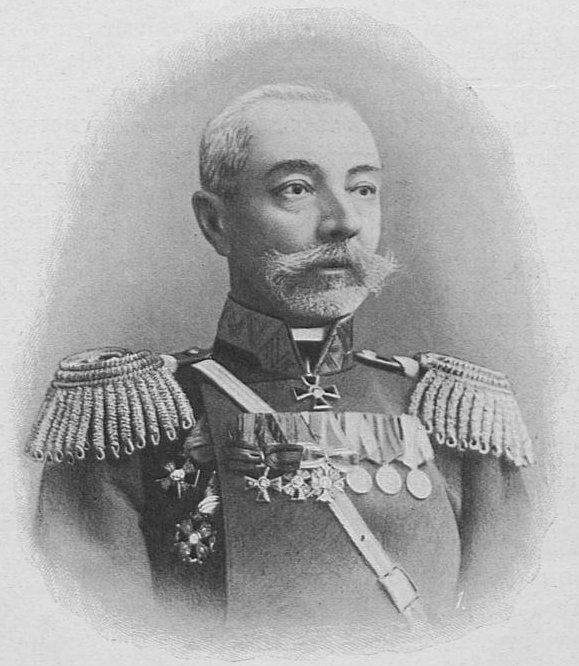 Белый, Василий Фёдорович